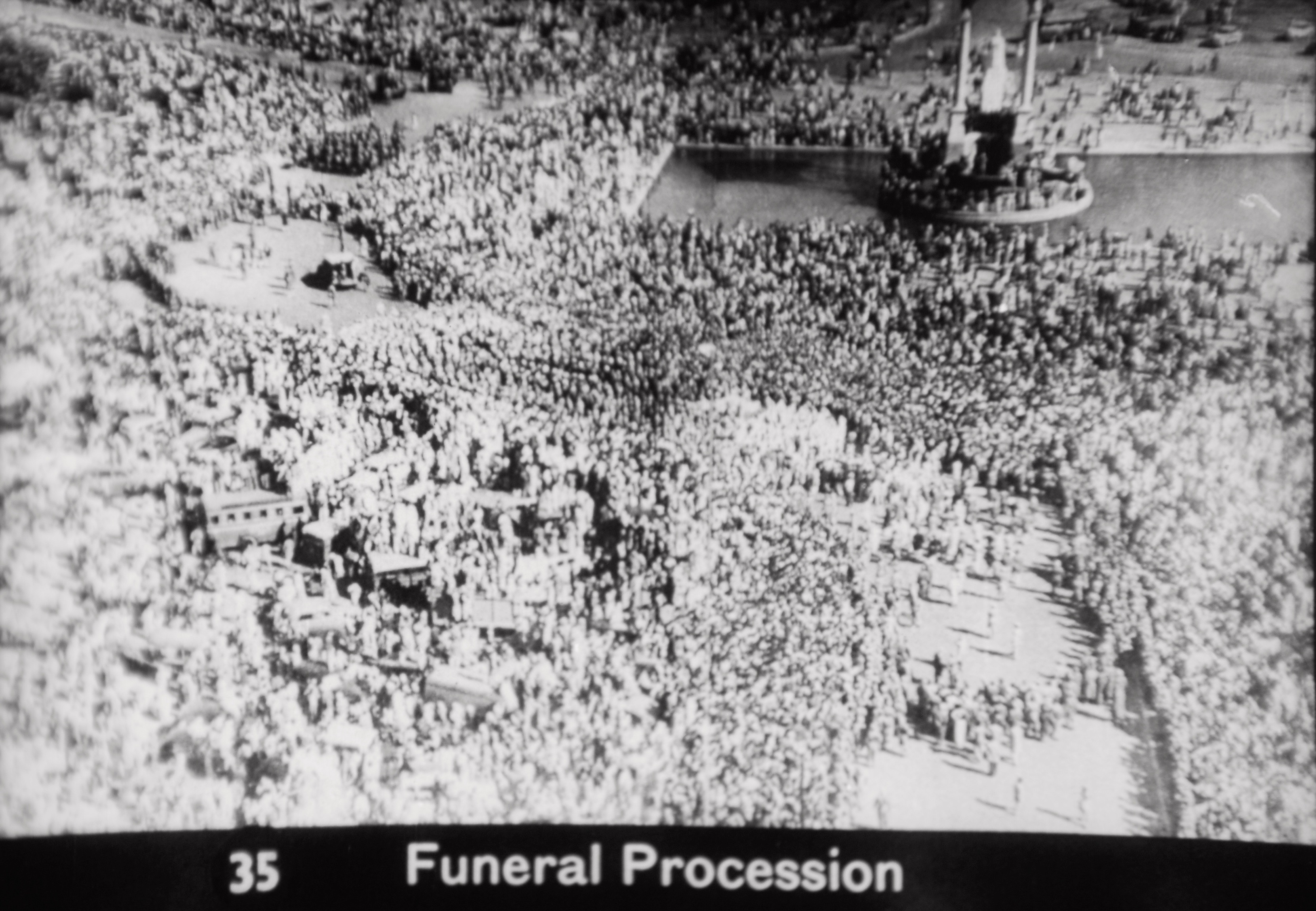 Gandhi funeral